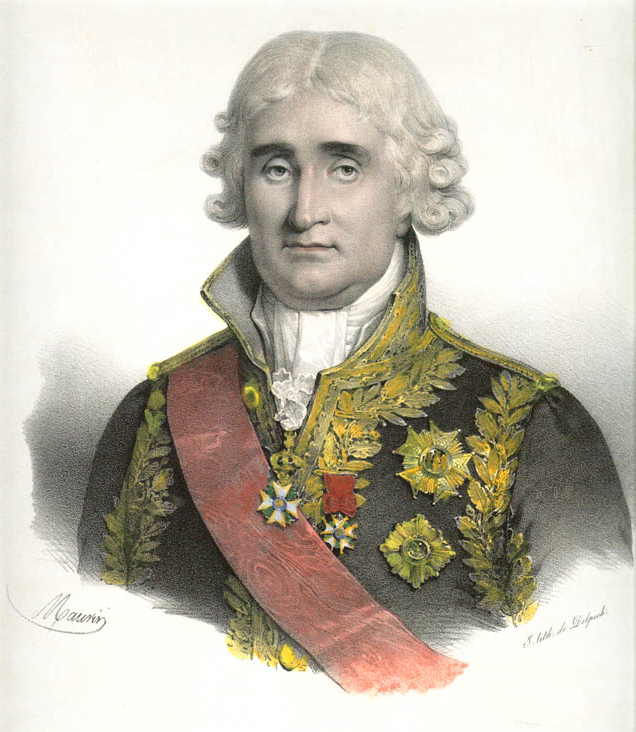 Portrait of Jean-Jacques-Régis de Cambacérès, duc de Parme